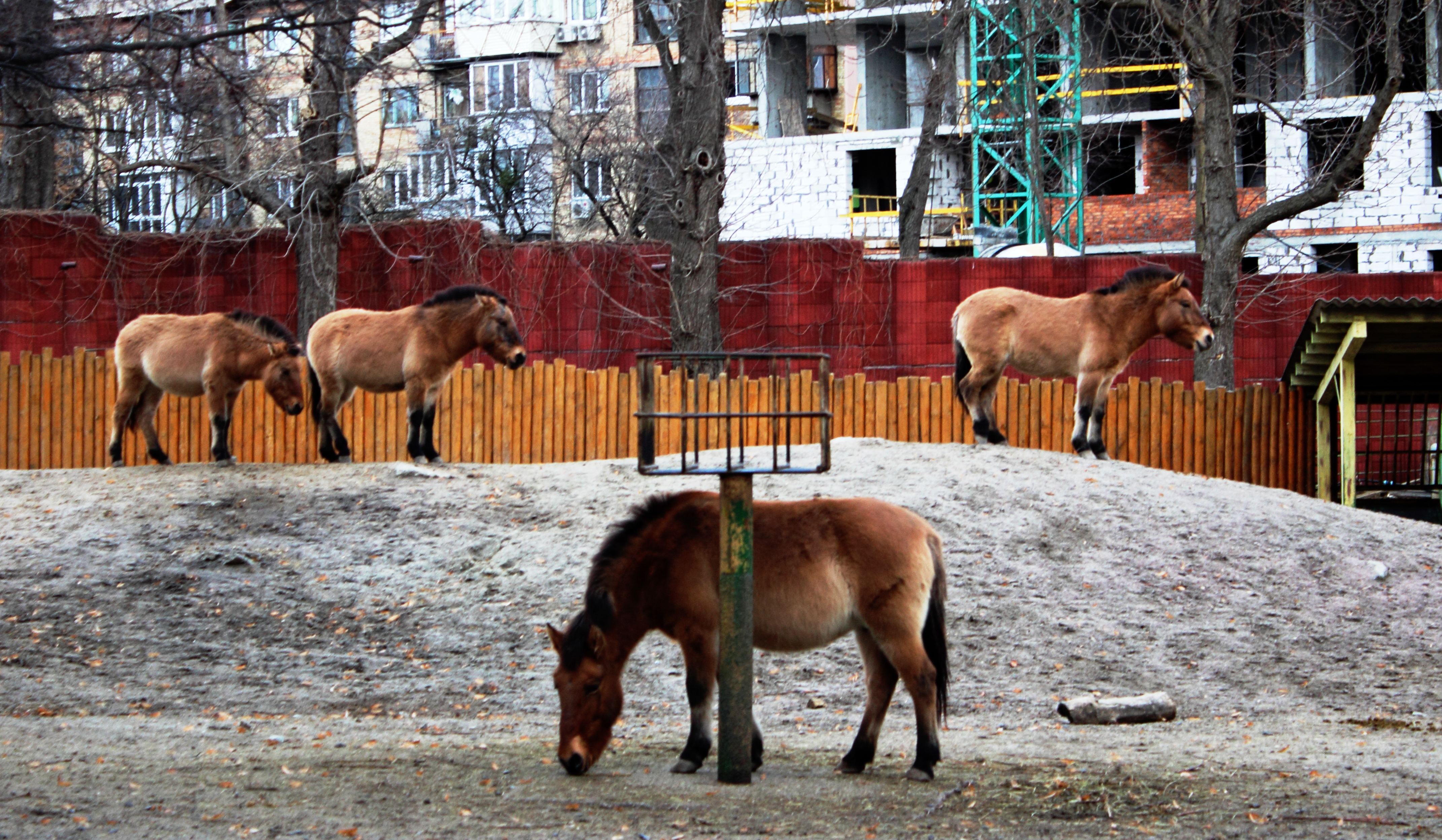 Київський зоопарк, Шевченківський район Жеребці вартують, кобили пасуться